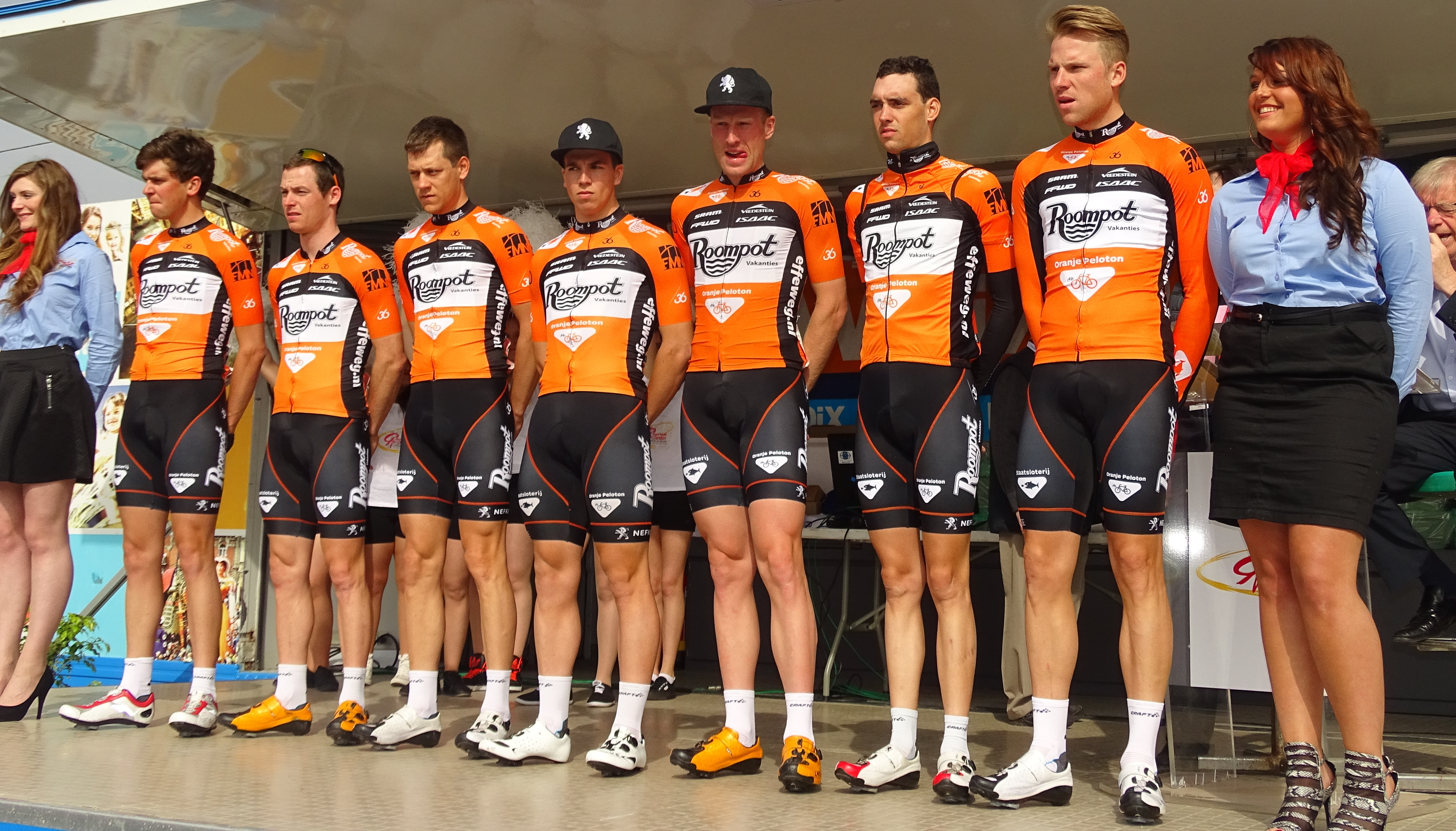 Reportage réalisé le jeudi 16 avril à l'occasion du départ et de l'arrivée du Grand Prix de Denain 2015 à Denain, Nord, Nord-Pas-de-Calais, France.